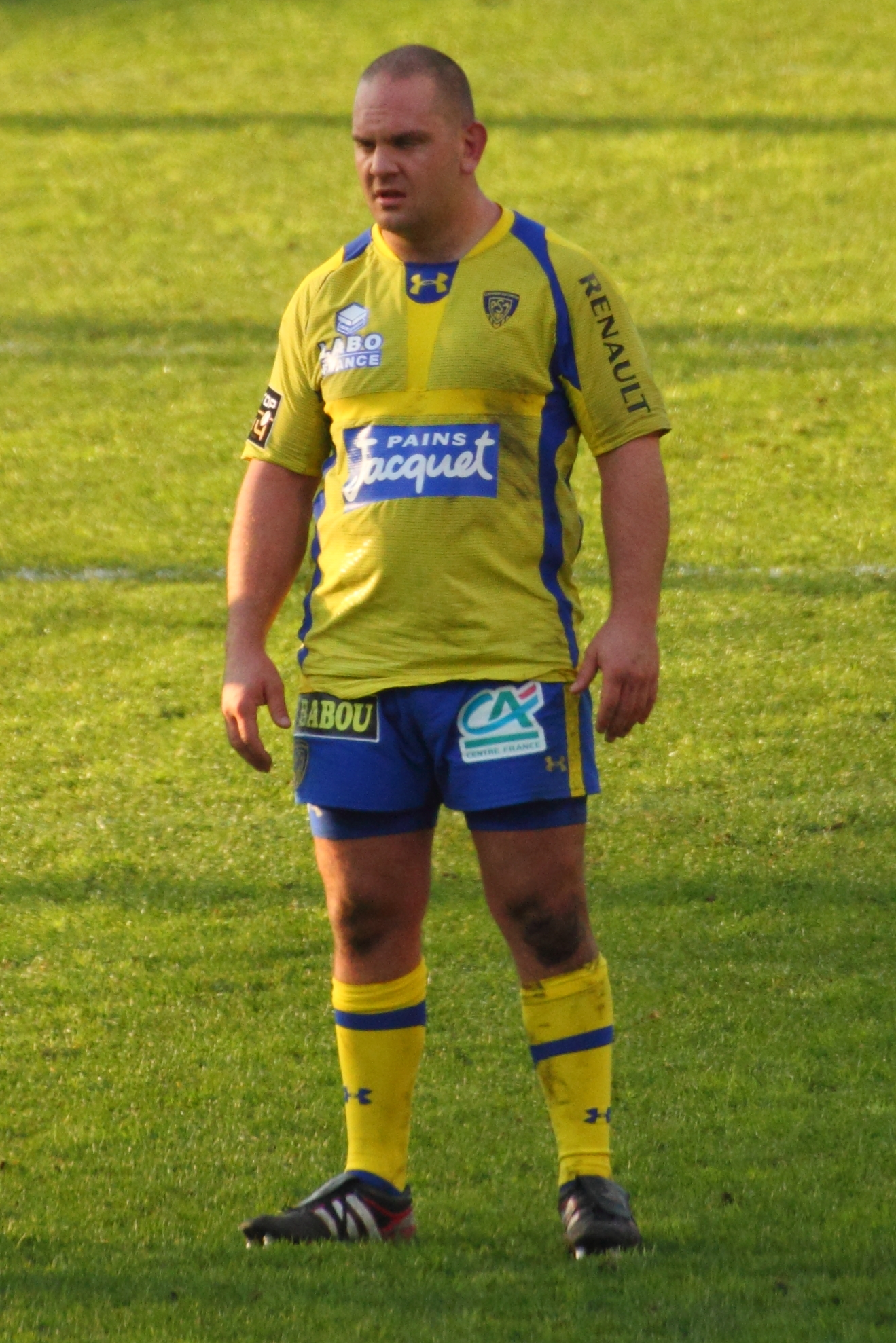 2012–13 Top 14 season — 1 décembre 2012, Stadium de Toulouse. Match between: Stade Toulousain — ASM Clermont-Auvergne